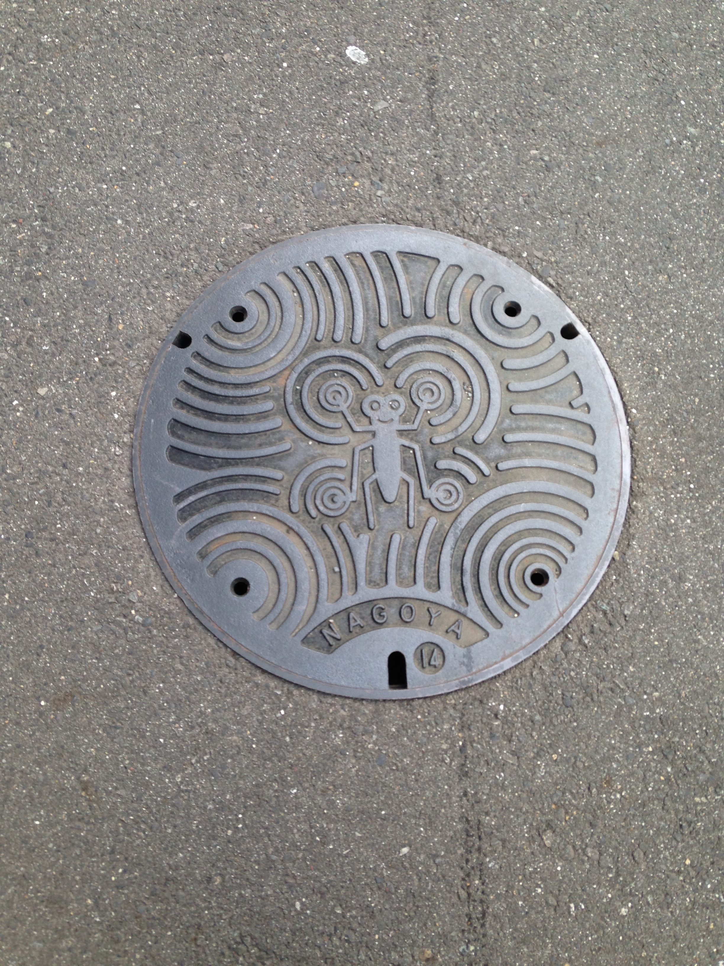 愛知県名古屋市のマンホール蓋